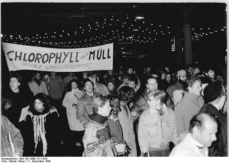 Berlin, Montagsdemonstration, Umweltschutz ADN-ZB Oberst 11.12.89 Berlin: Demonstration- "Chlorophyll statt Müll" war nur eine der vielen Losungen bei der obligaten Montagsdemo im Stadtzentrum, die diesmal Belange des dringend notwendigen Umweltschutzes in den Mittelpunkt rückte.